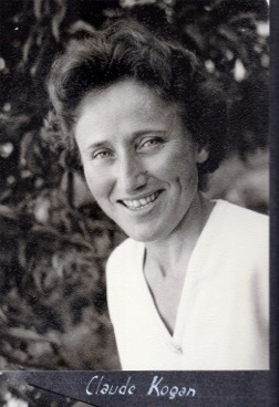 Claude Kogan lors de l'expédition féminine de 1959 au Népal.